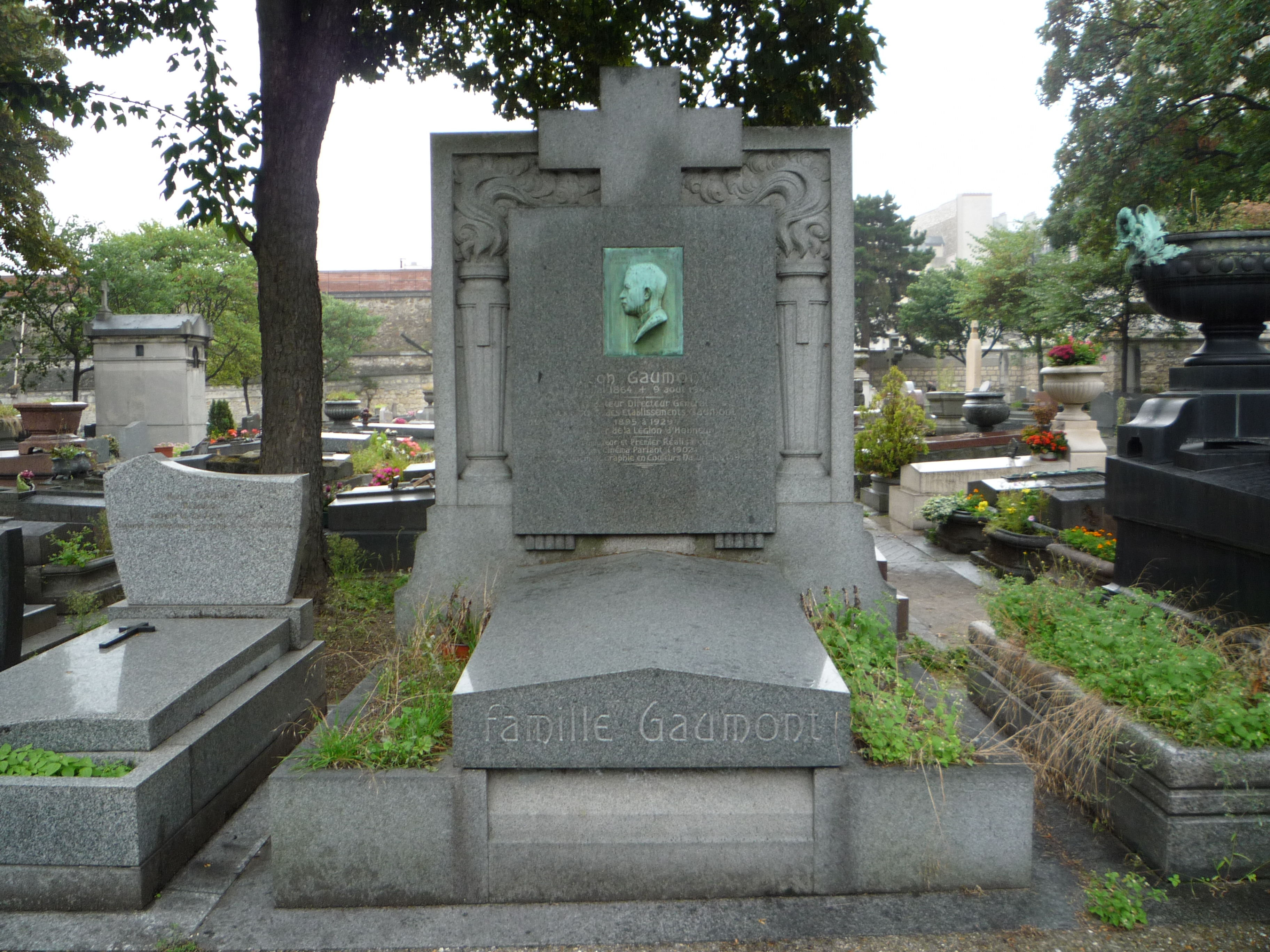 Dans cette tombe se trouvent également avec Léon Gaumont plusieurs membres de la famille Gaumont : Camille Gaumont, née Maillard (1859 - 1933), Louis Gaumont, (1899 - 1978), fils de Léon et de Camille Gaumont, Simone Gaumont, née Gille, manequin, (1910 - 1983), épouse de Louis Gaumont, Claude Boulouque, née Gaumont (1921 - 2013), fille de Louis et Simone Gaumont, Pierre Boulouque, né Boulouk, avocat, (1915 - 1984), époux de Claude Gaumont, Gilles Boulouque, magistrat français, (1950 - 1990), fils de Pierre et Claude Boulouque. Sur la pierre tombale, il est inscrit : Léon Gaumont 10 mai 1864 9 août 1946 Promoteur et premier réalisateur du cinema parlant (1902) et de la cinématographie en couleur naturelle (1912) Fondateur et directeur general de la société des établissements Gaumont 1895 à 1929 Officier de la légion d'honneur